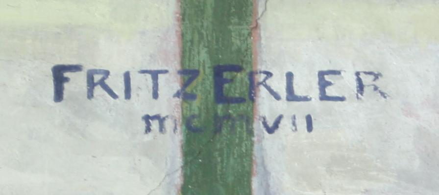 Namenszug Fritz Erler MCMVII auf einem Wandgemälde im Muschelsaal des Kurhaus Wiesbaden